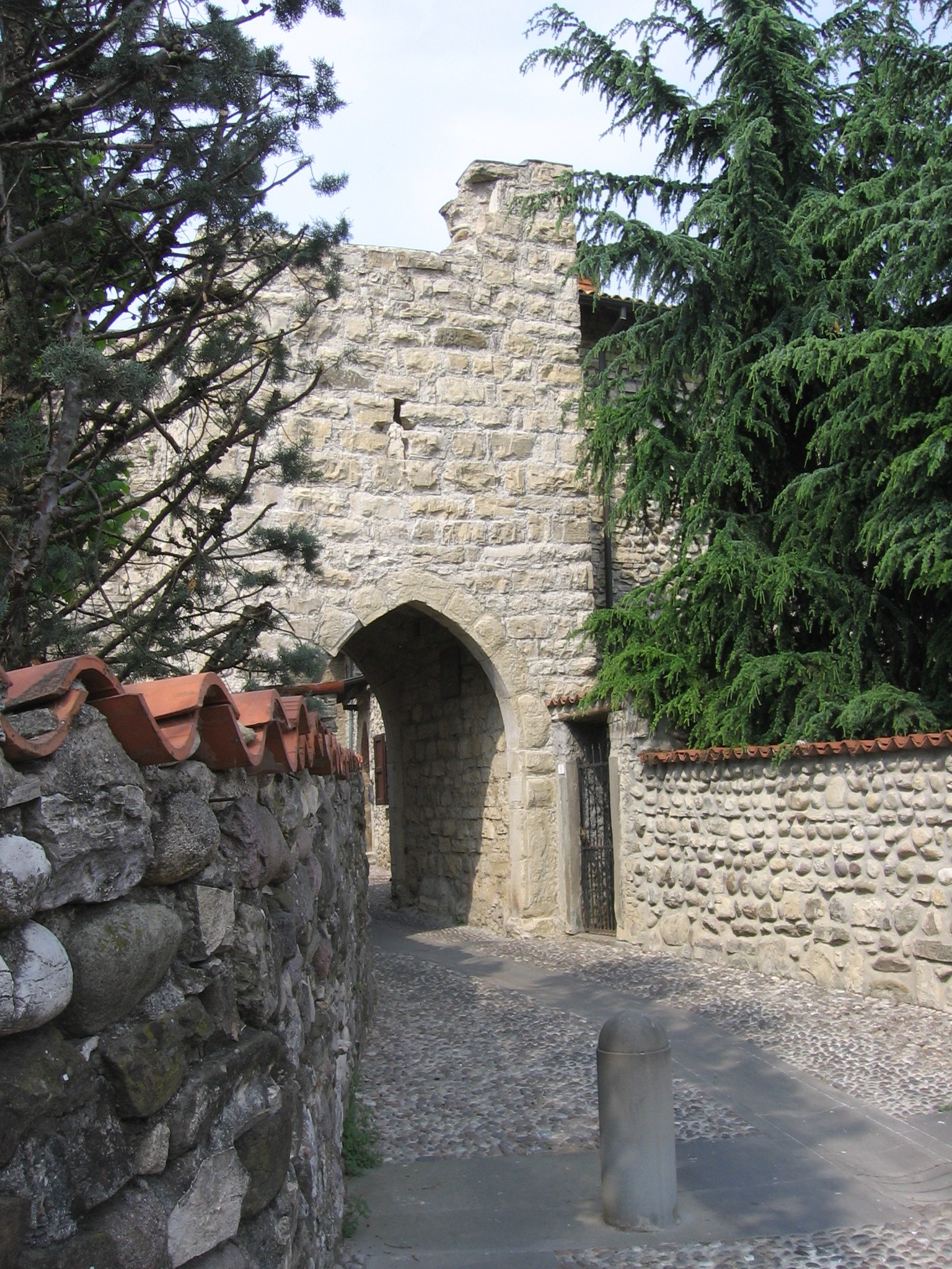 Castello Trebecco (X sec.), Credaro, Bergamo, Italia